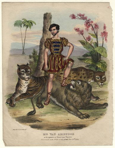 Isaac van Amburgh (1808–1865) amerikanischer Dompteur Lithographie von T. C. Wilson, 1838 National Portrait Gallery, London